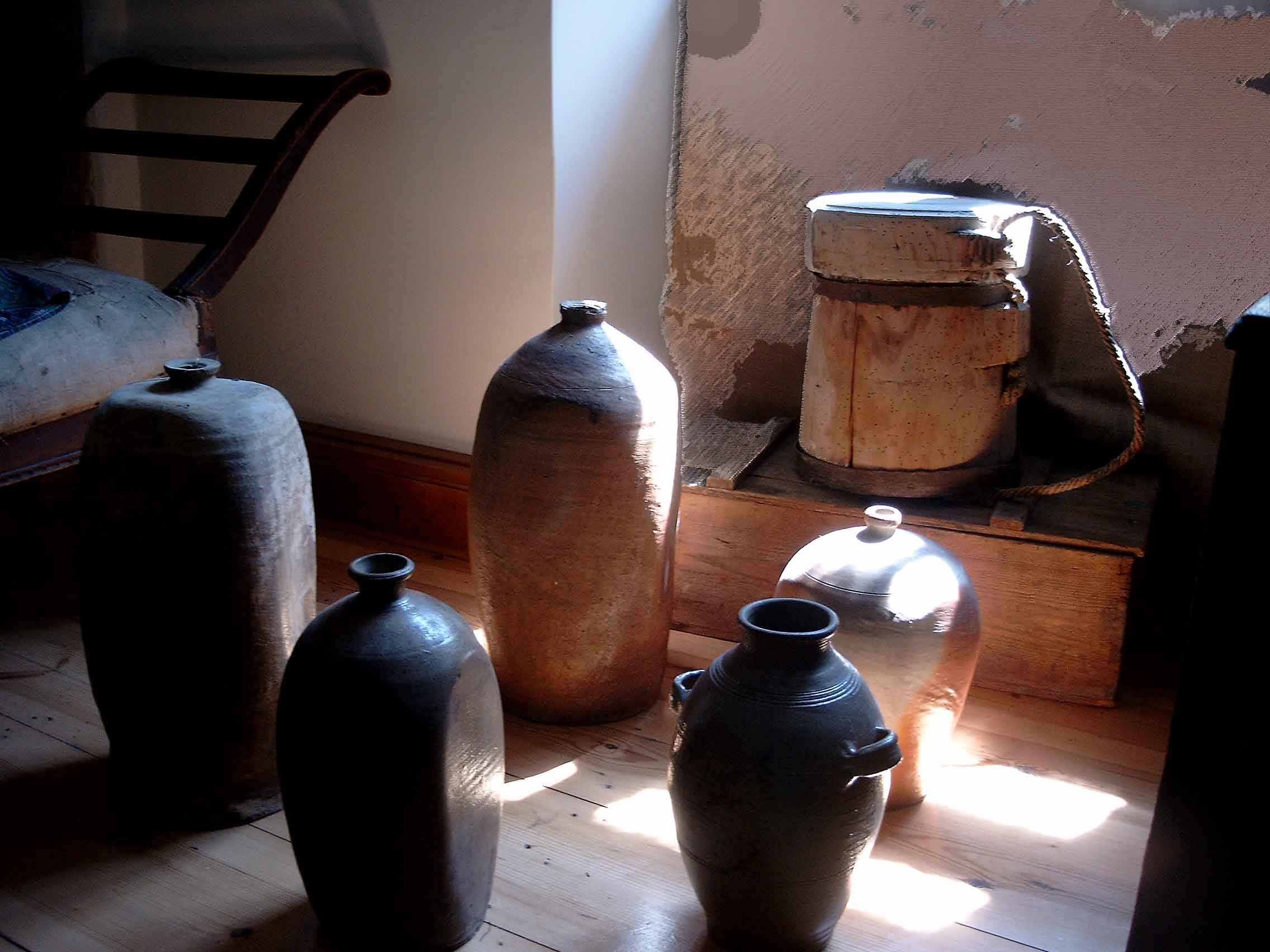 Detail einer Ausstellung im Museum Schloss Tenneberg